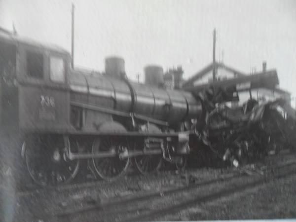 Am 17. August 1915 fuhr ein Schnellzug in Dietikon auf einen stehenden Personenzug auf, weil das Einfahrsignal zu früh geöffnet worden war.